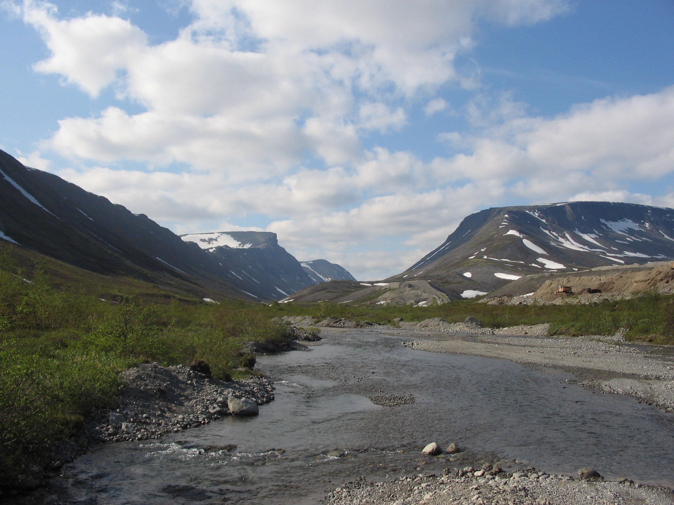 Вудъяврйок